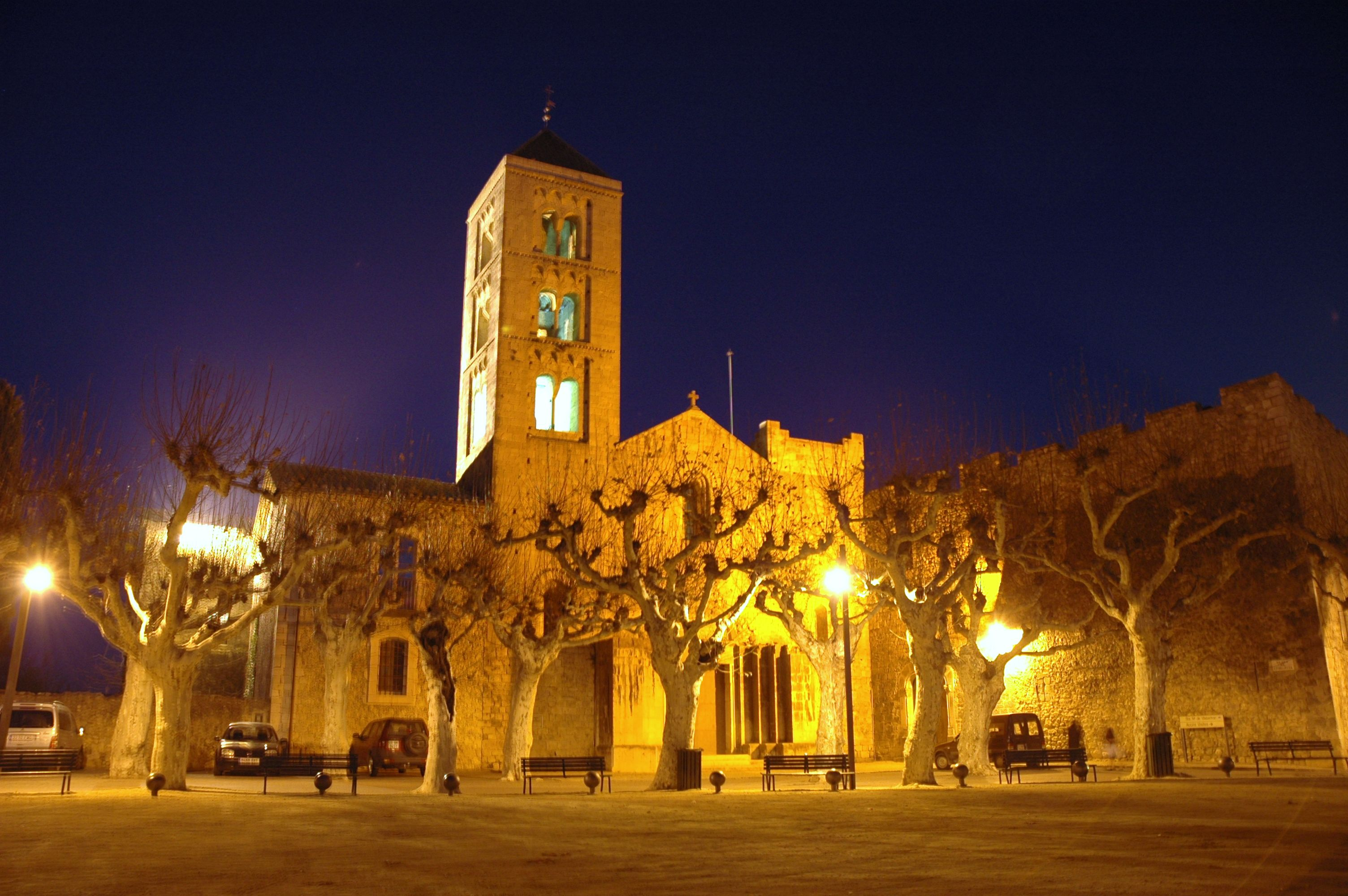 Santa Maria de Vilabertran, de nit.